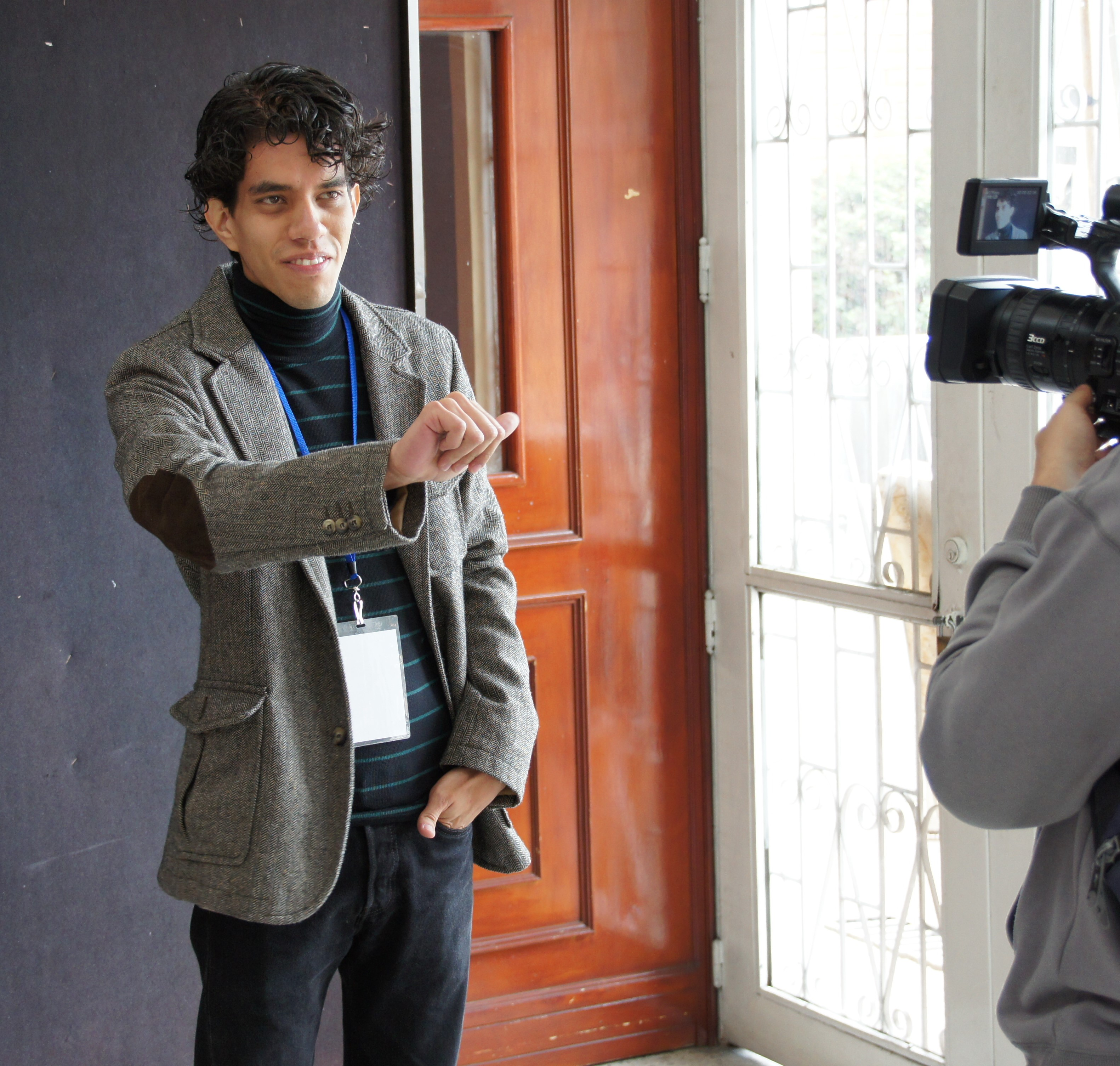 Sergio Rosales